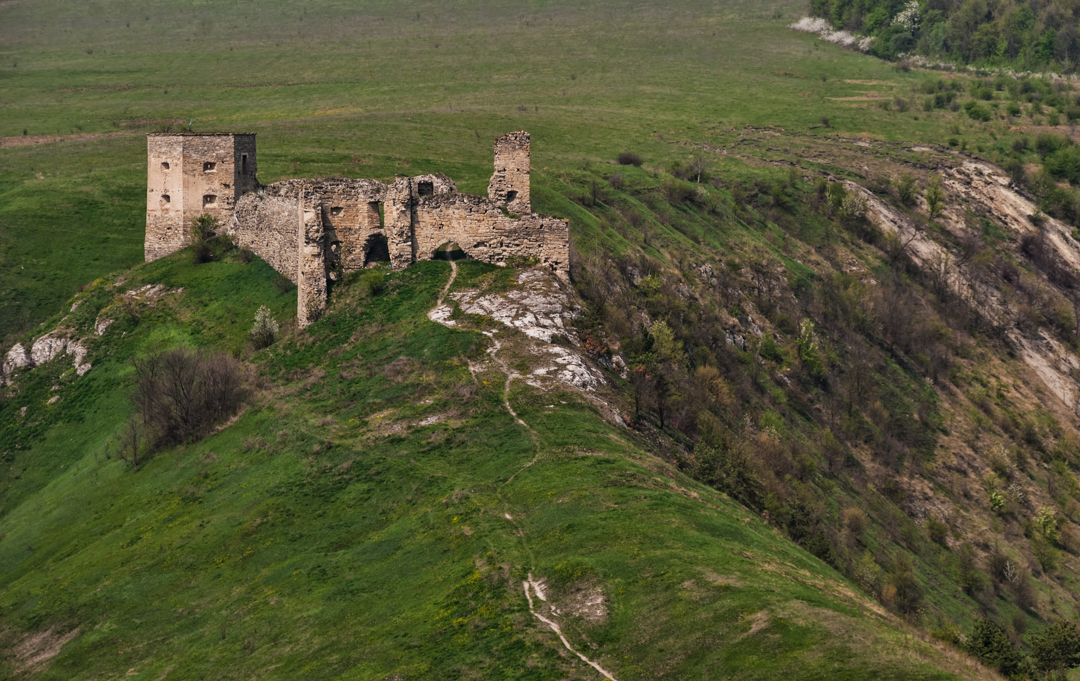 Замок (руїни), Кудринці